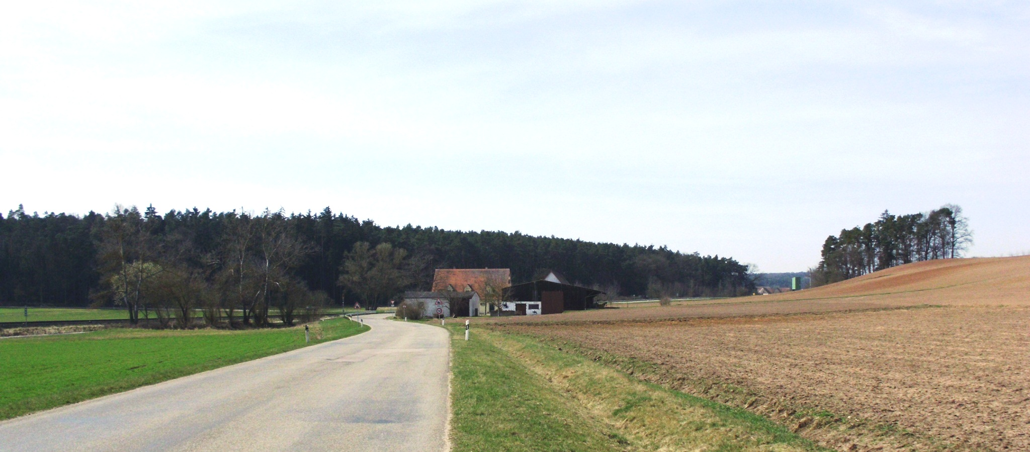 Sorghof, Ortsteil von Pfofeld im Landkreis Weißenburg-Gunzenhausen in Bayern